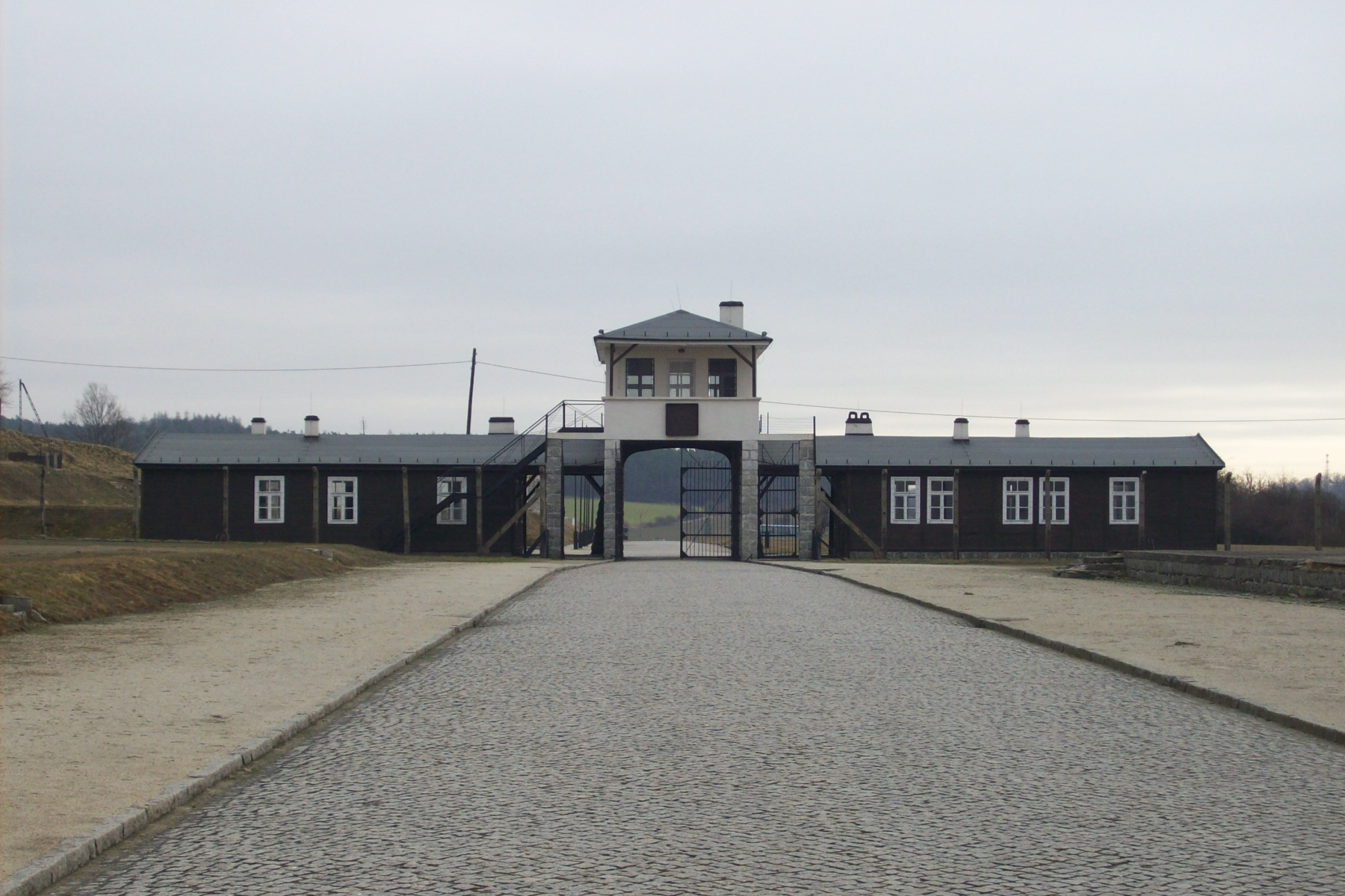 Wejście do Muzeum Gross-Rosen w Rogoźnicy